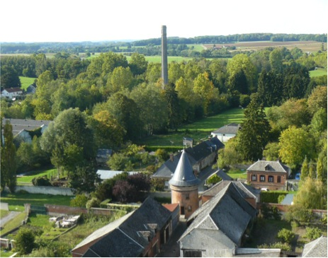 Deux vestiges du passé d'Aubenton : la tour médiévale de Chimay et la cheminée d'usine